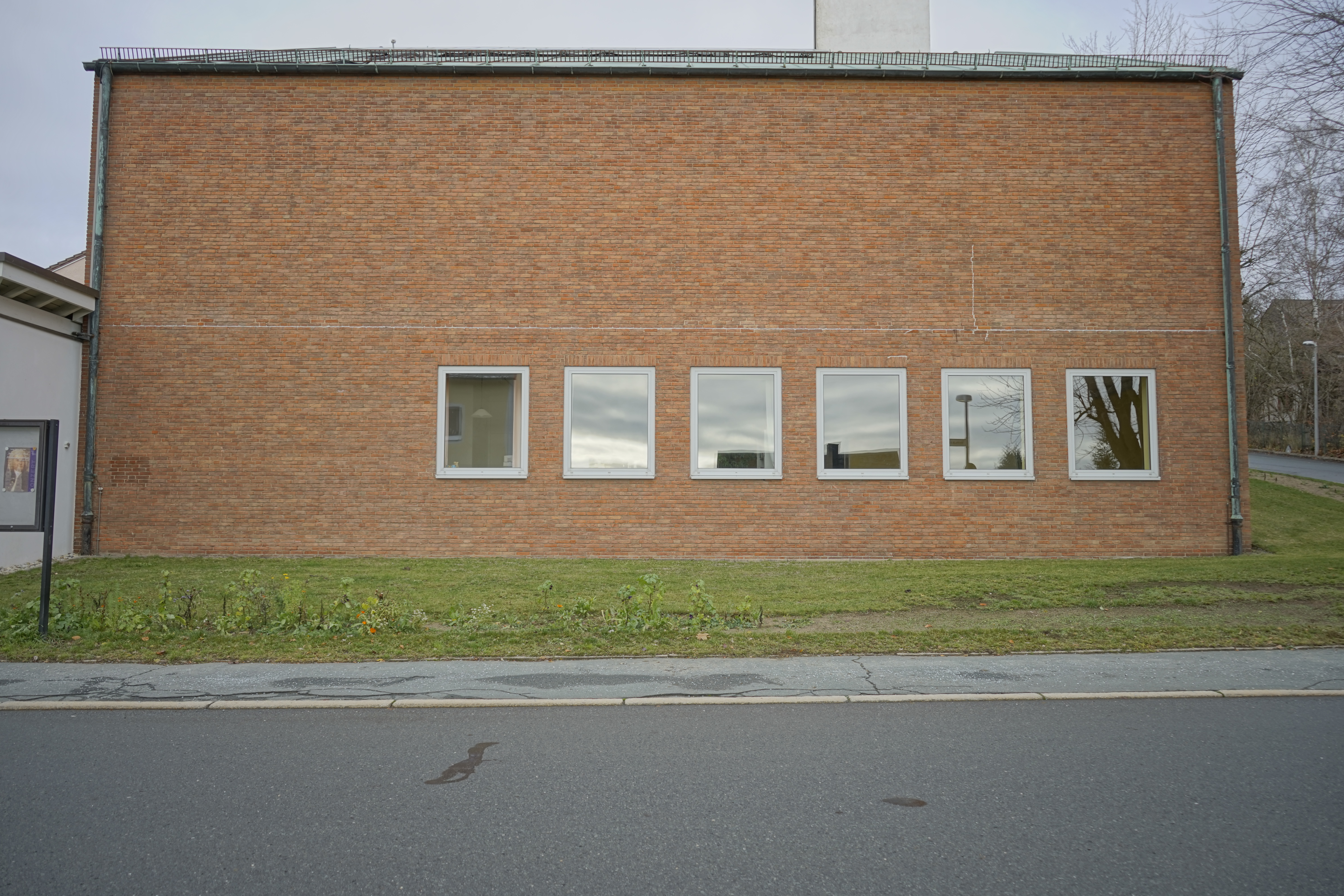 Der Klinkerbau der Dreieinigkeitskirche Hof.